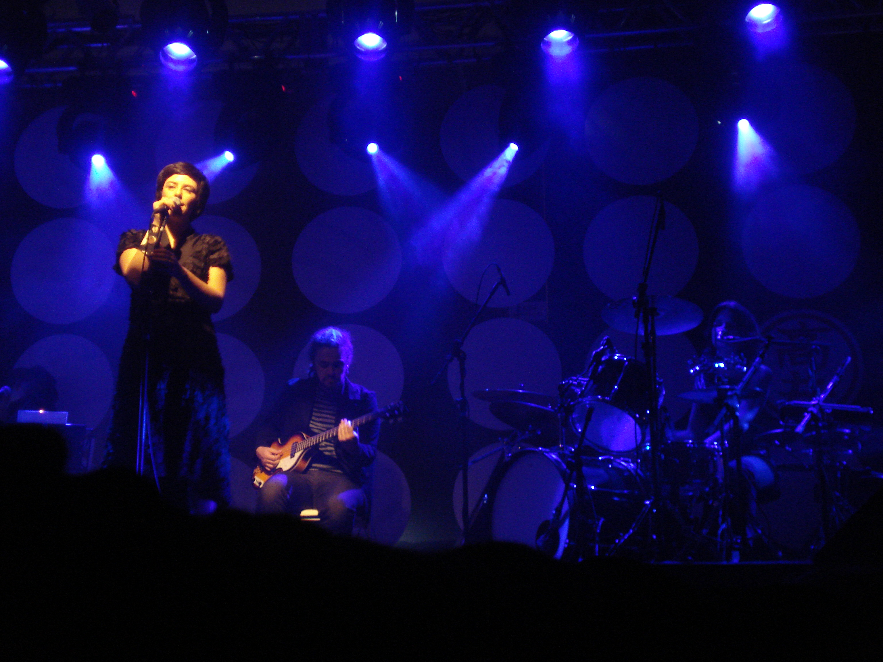 Show da Fernanda Takai em Joinville, no dia 17 de setembro de 2009, no V12 Lounge.